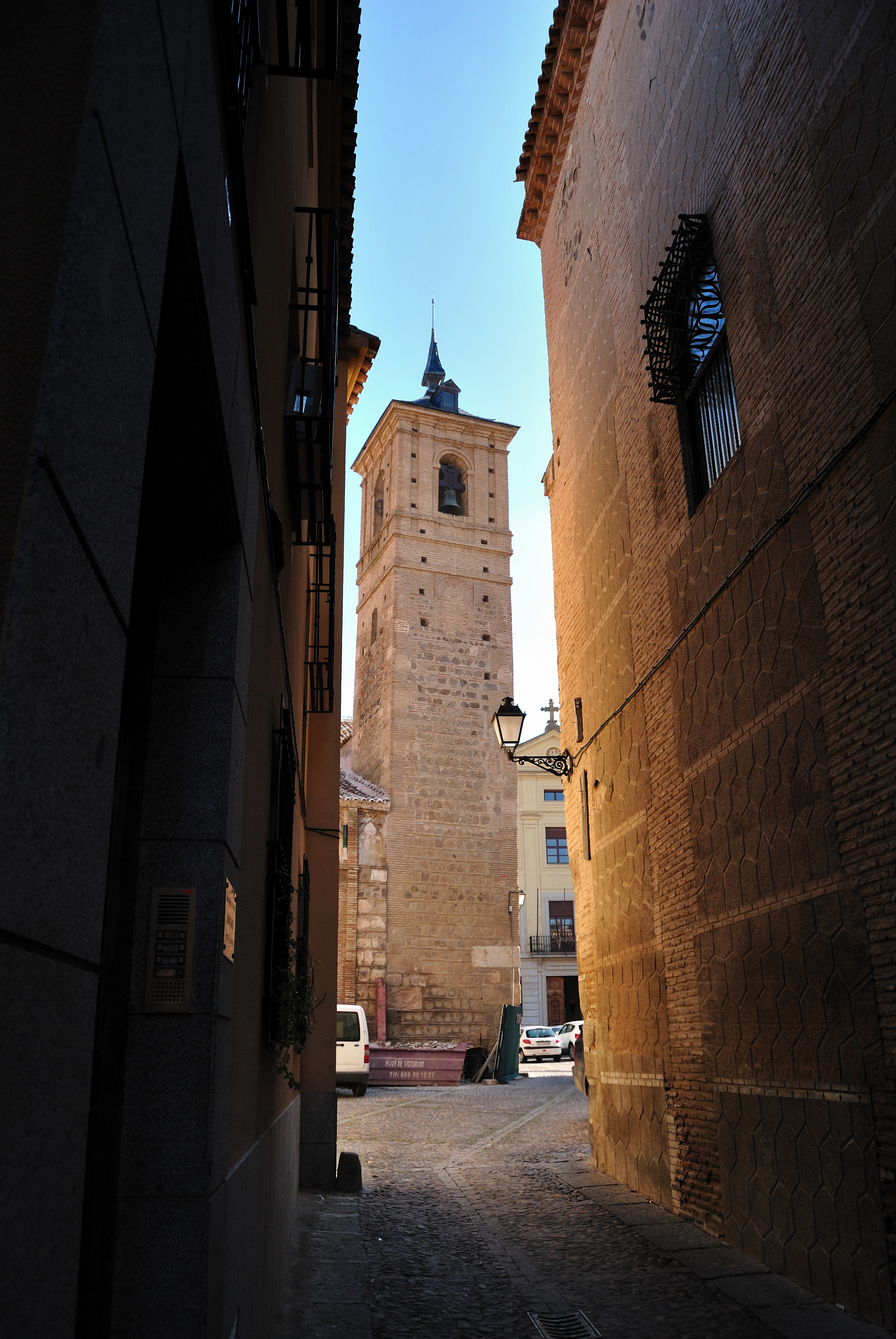 Torre de la iglesia de San Andrés, actualmente en restauración. Toledo, España.